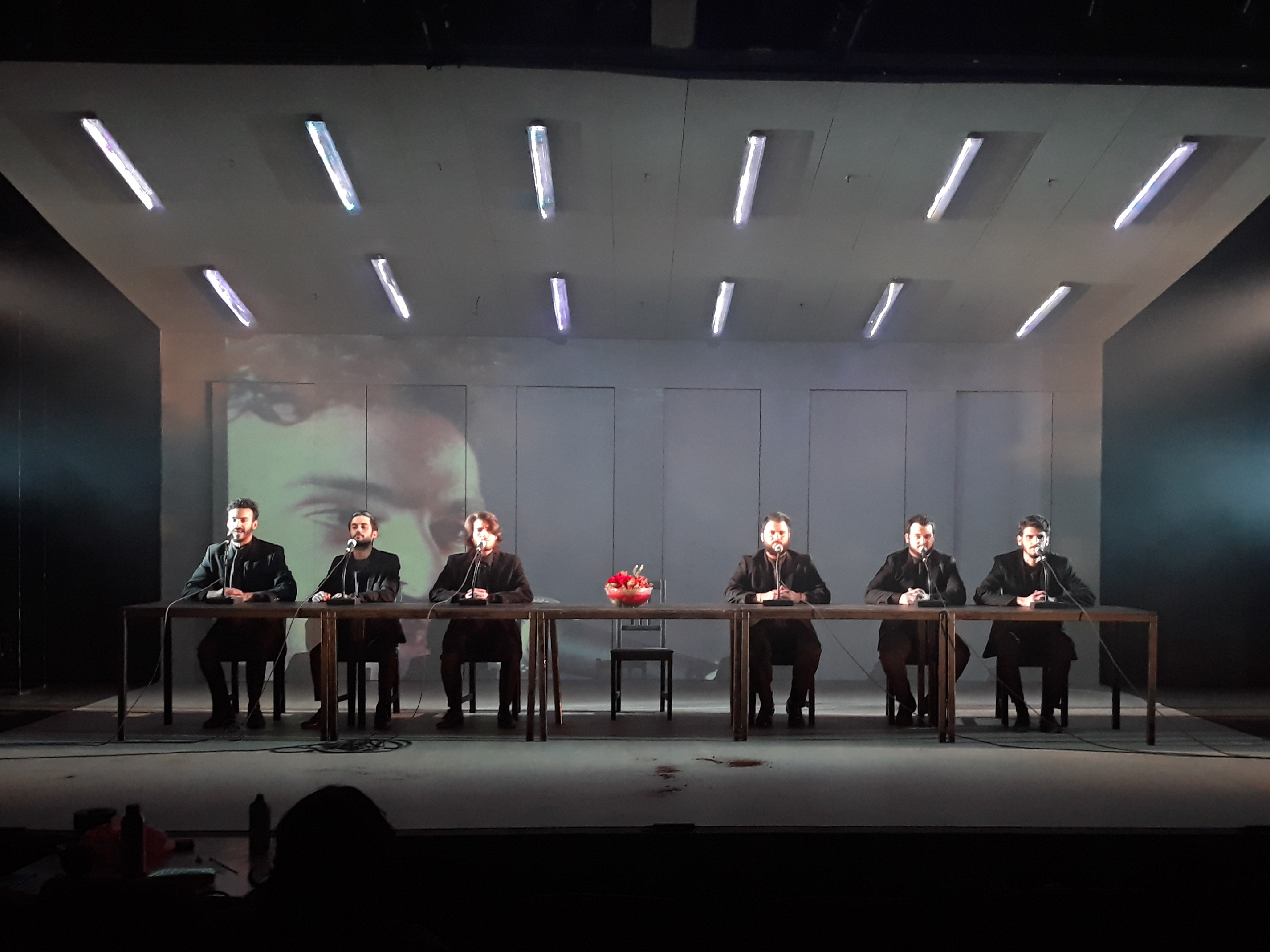 אנטיגונה - בית ספר למשחק בנגב - גודמן. 2020 מאת: סופוקלס בימוי: כפיר אזולאי